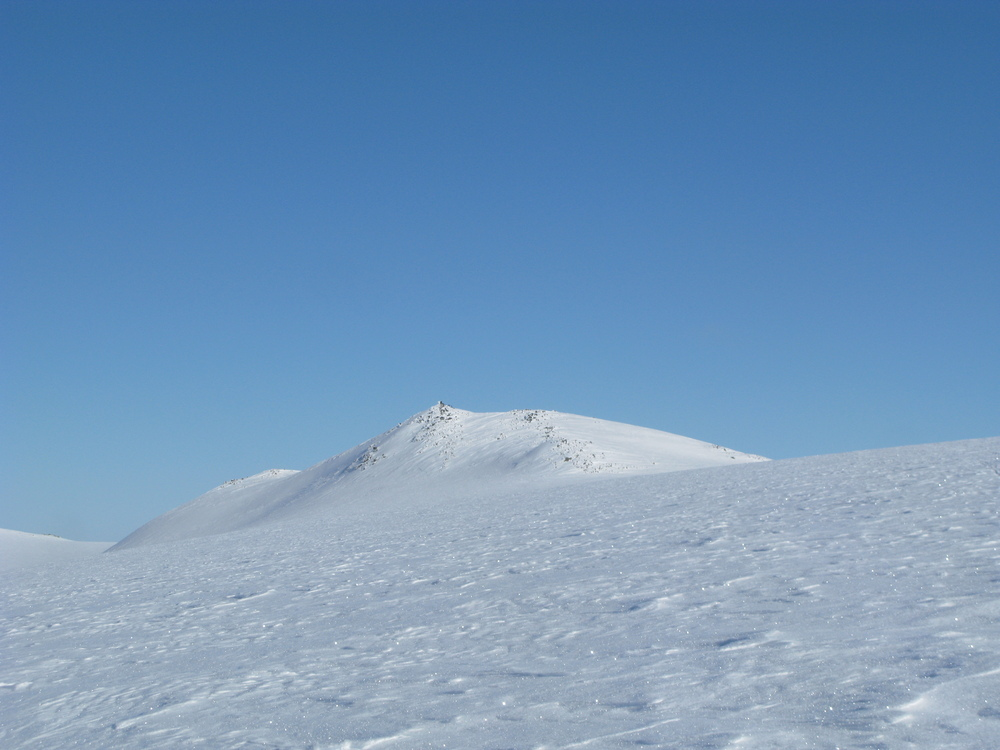 Bilde av Loppatind